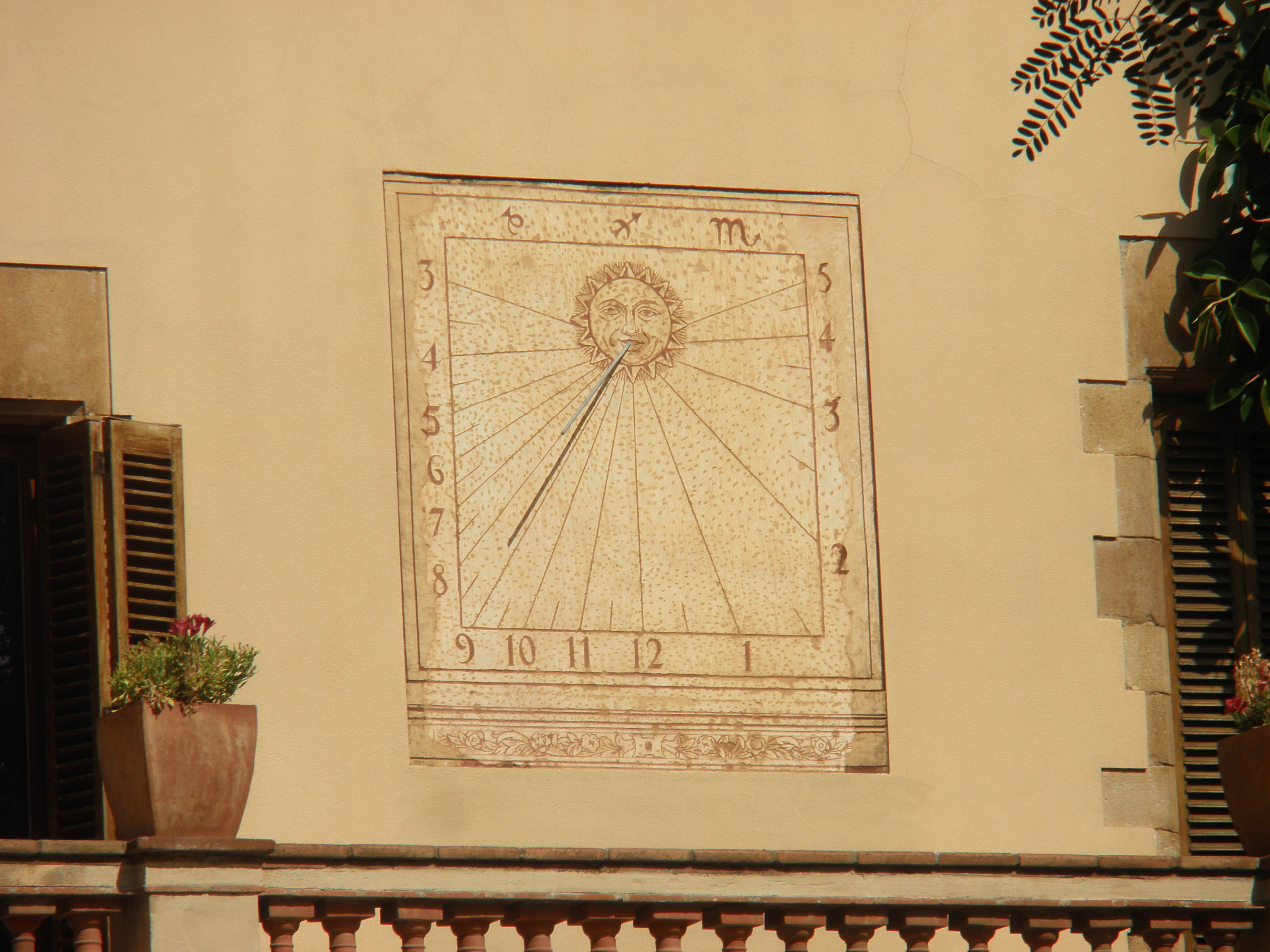 Rellotge de sol - Sundial (Barcelona, Catalonia)